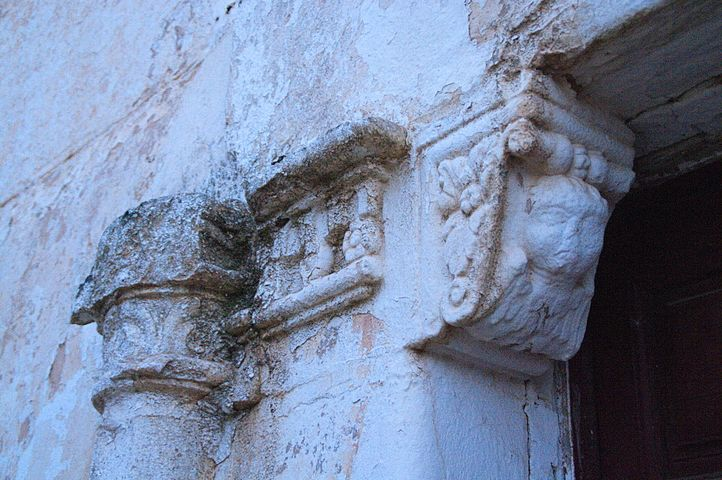 Detalle de la ménsula izquierda presente en la portada principal. El motivo iconográfico es una arpía que cumple la función de elemento protector.